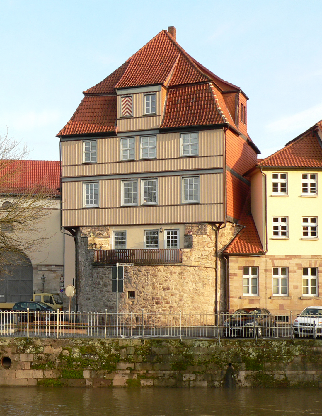 Altes Sydekum